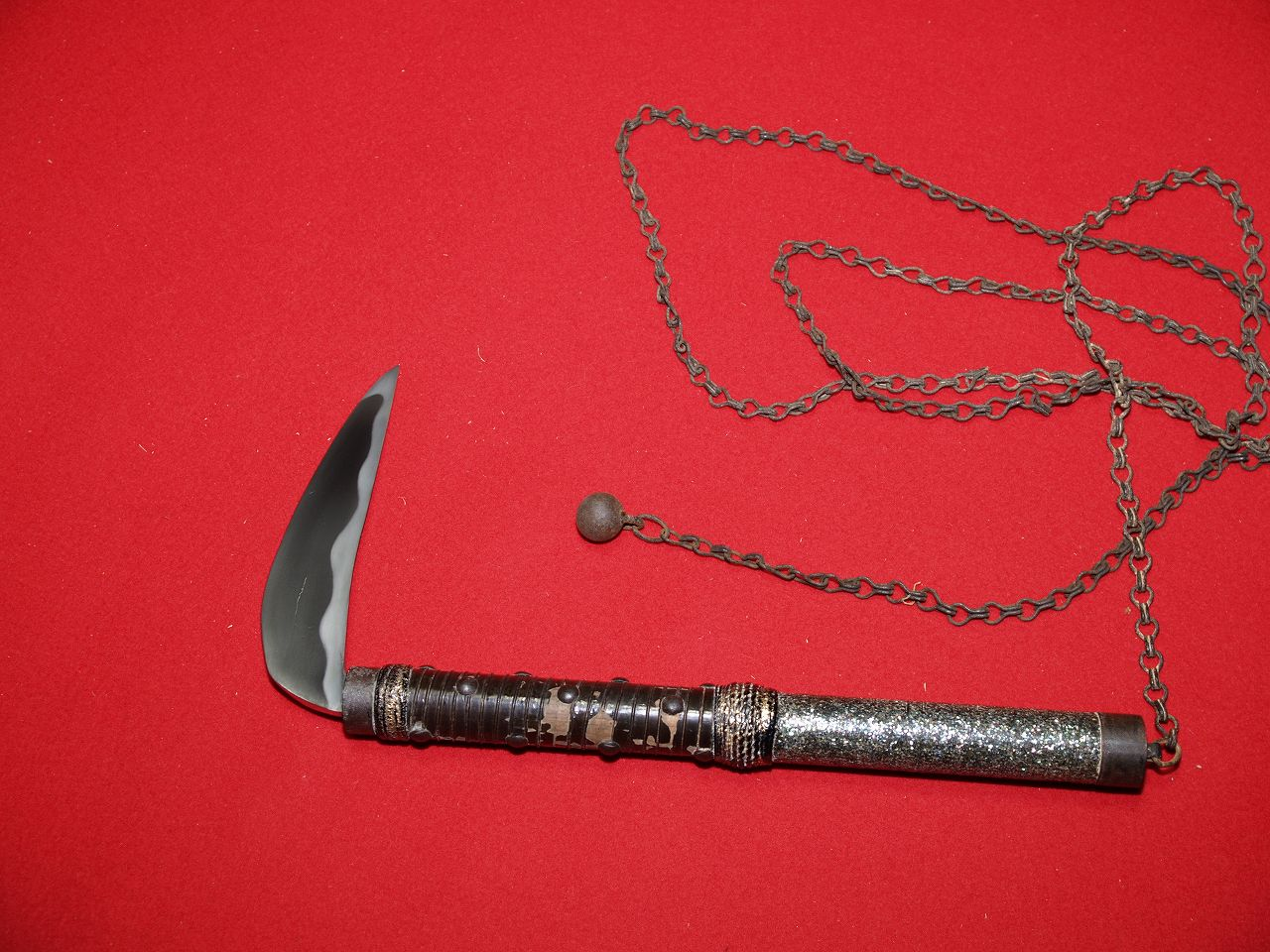 鎖鎌